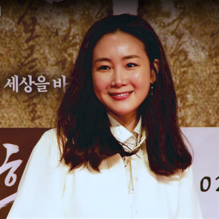 영화 '흥부' VIP시사회 포토월